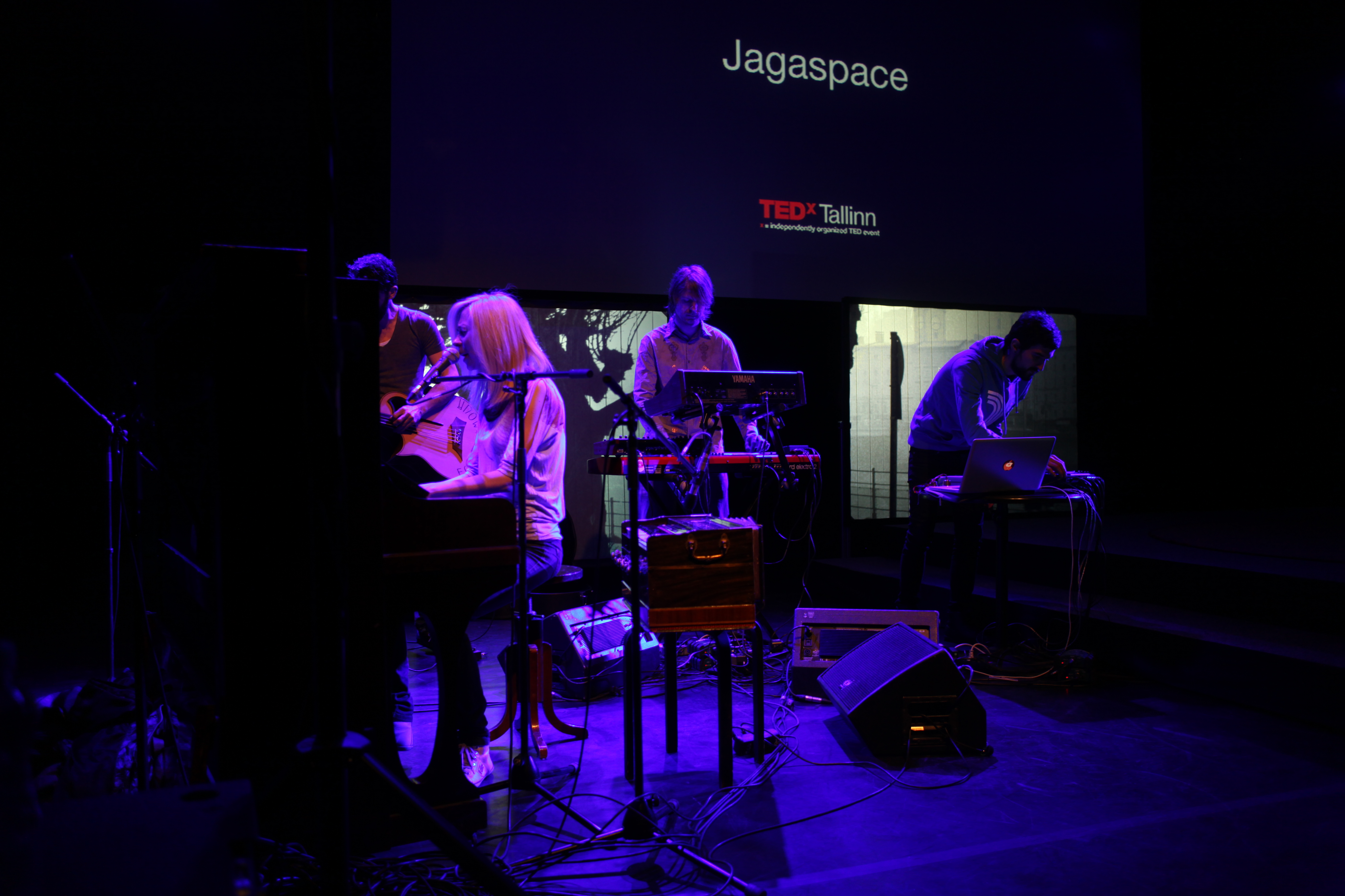 Jagaspace esinemas TEDxTallinn konverentsil 2012. aastal.